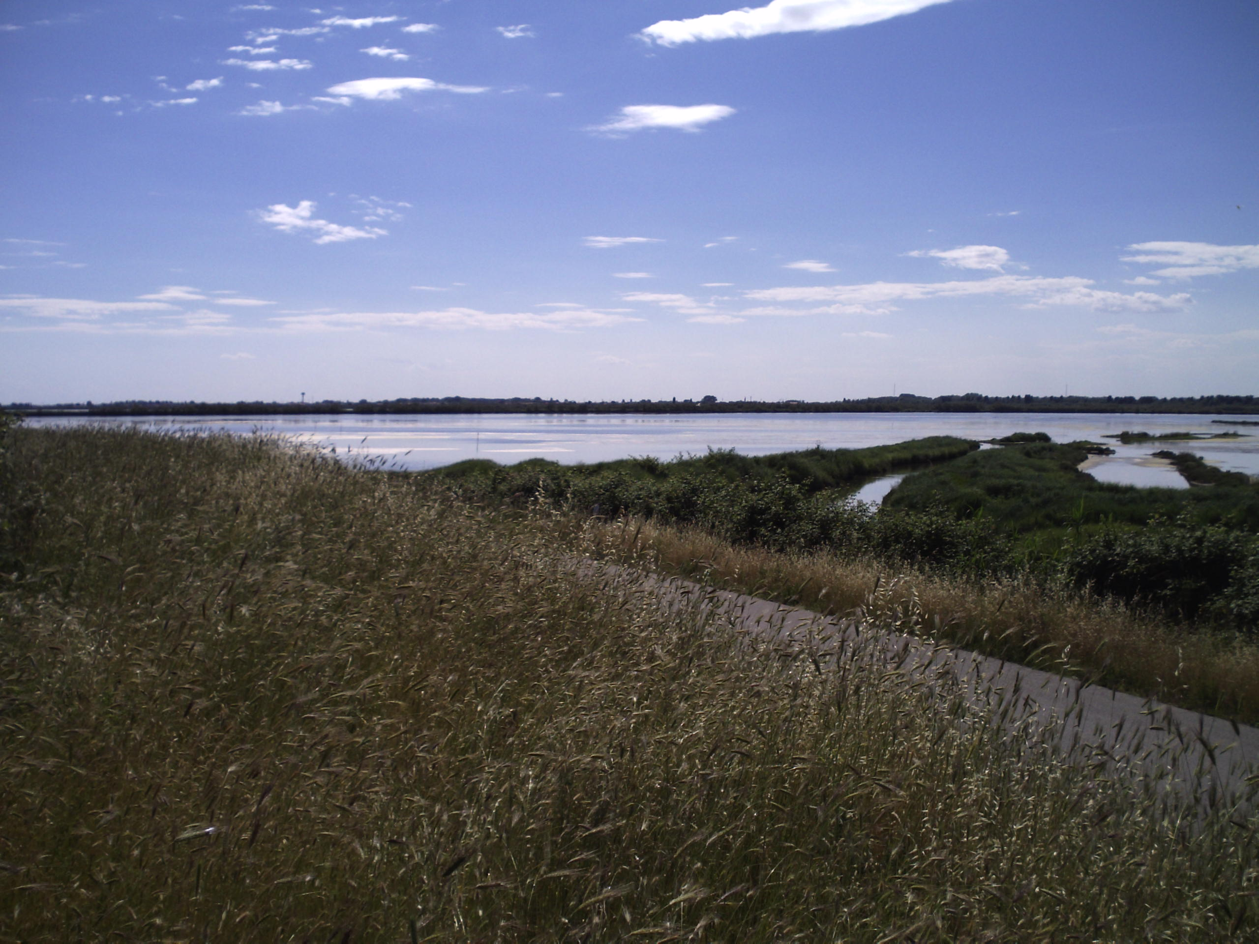 Una valle da pesca nel territorio comunale di Rosolina (RO)